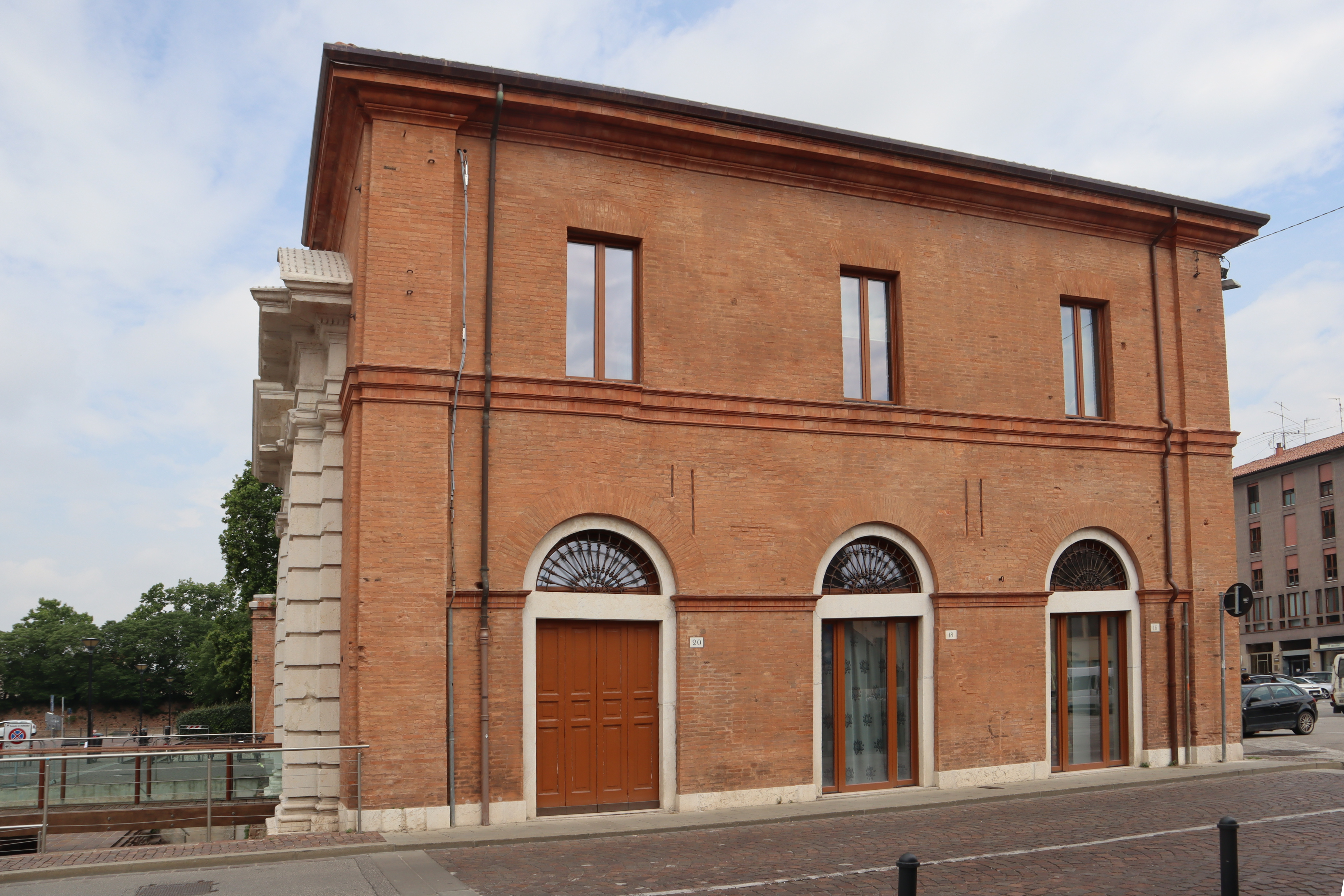 Porta Paola a Ferrara. Prospetto ovest.